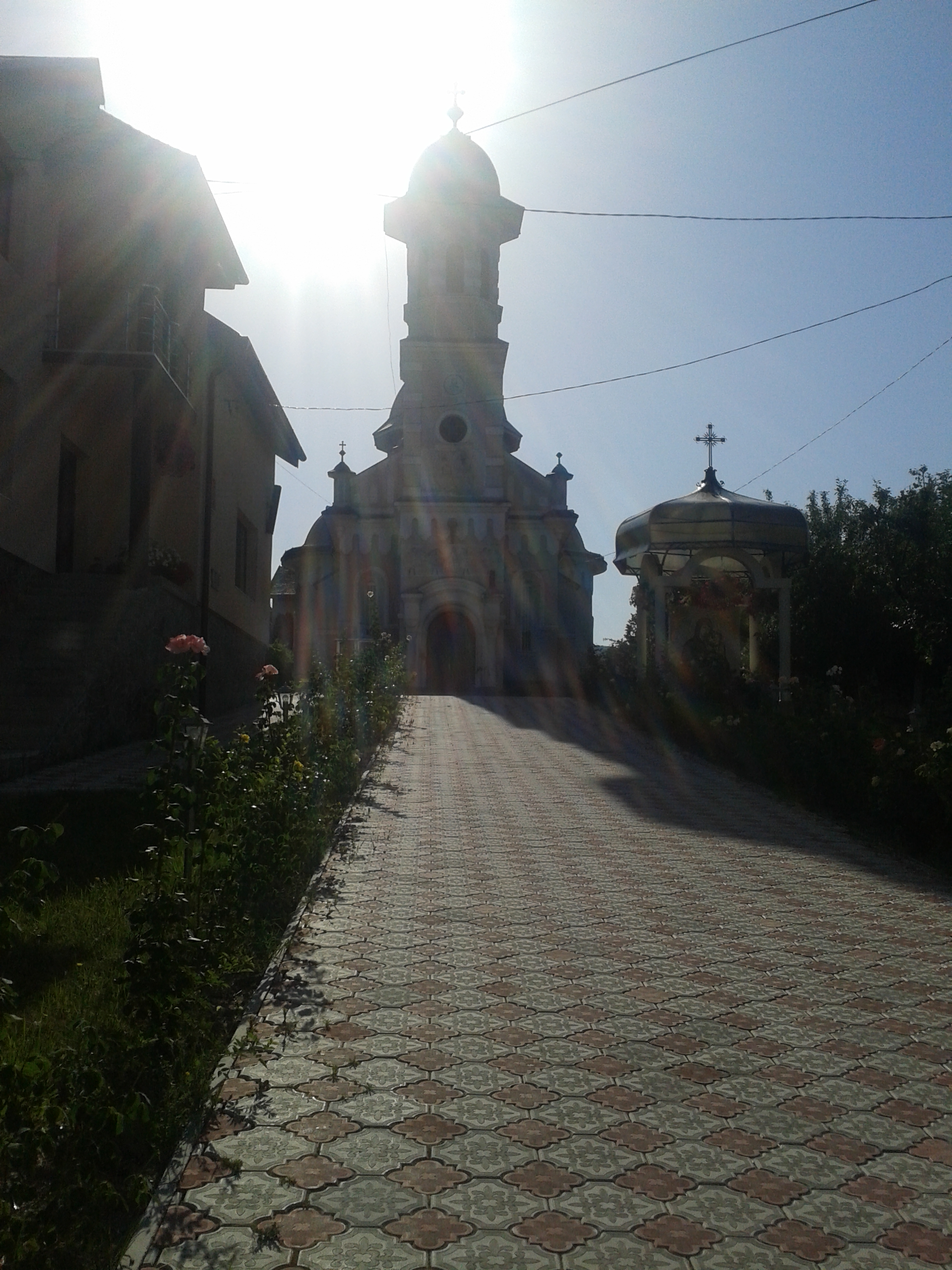 Biserica Ortodoxă Sfânta Treime de pe strada Andrei Şaguna din Zalău.